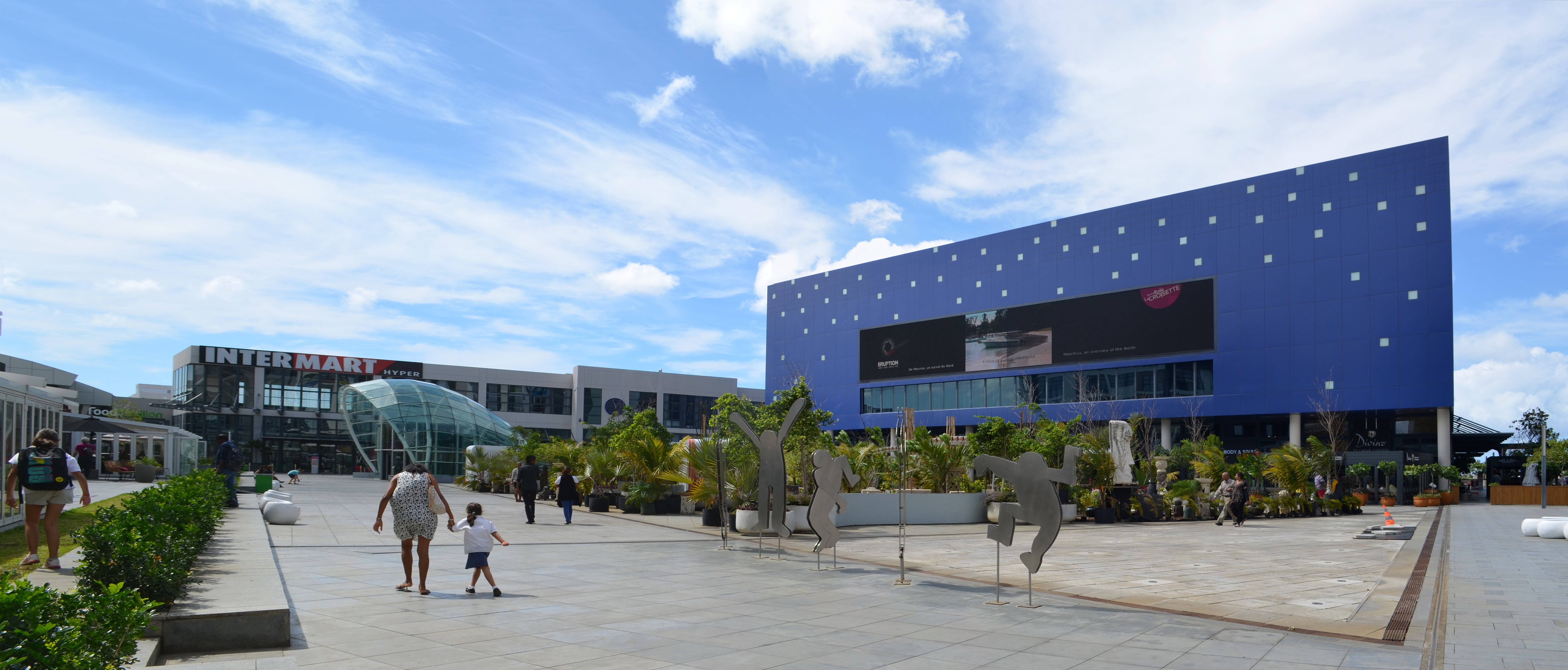 Grand Baie, shopping mall La Croisette